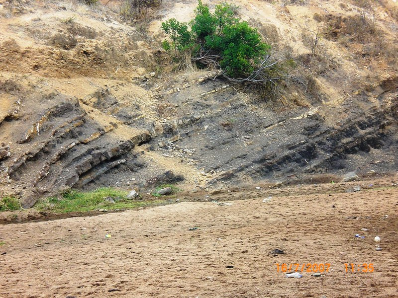 Bacia_Carbonífera_de_Moatize_em_Tete